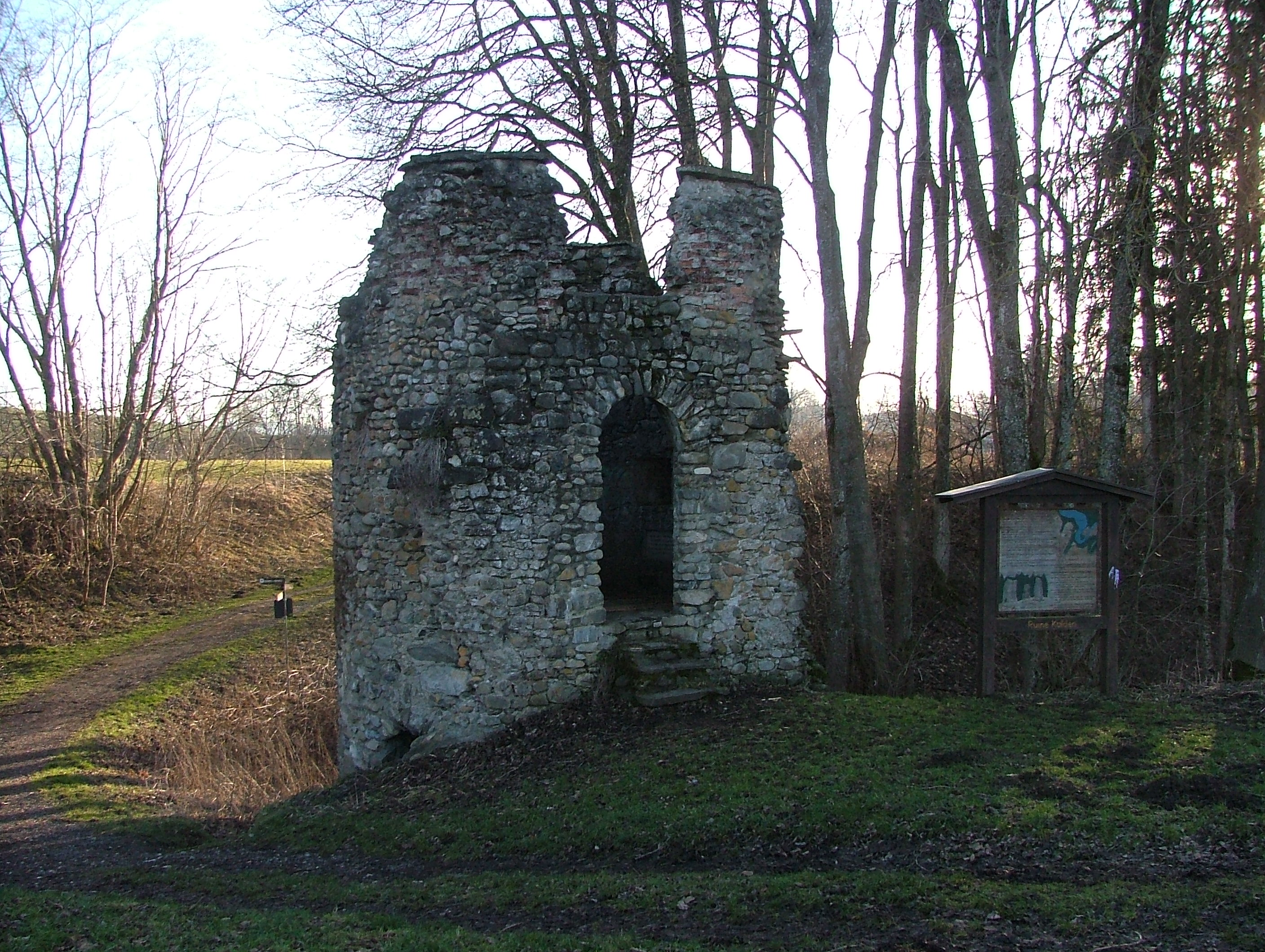 Ruine Kalden, Altusried, Oberallgäu